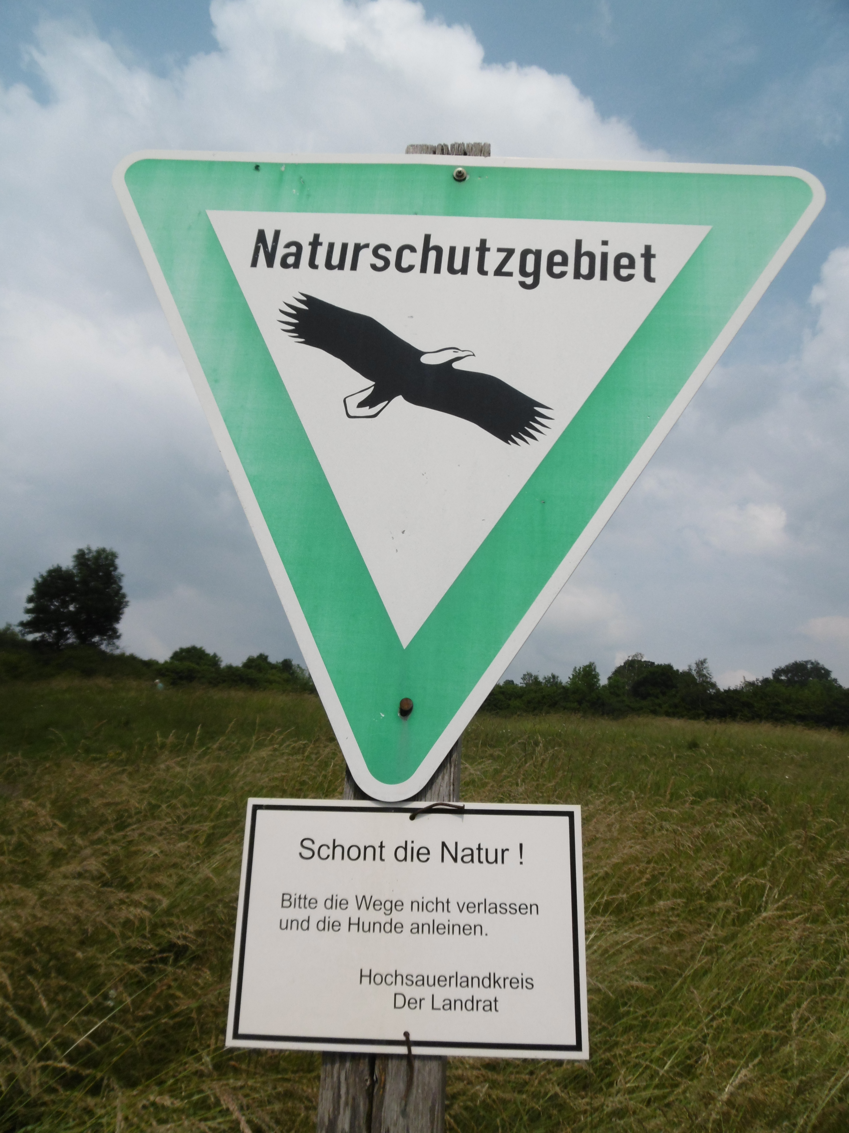 NSG Schild im Naturschutzgebiet Spreiberg.